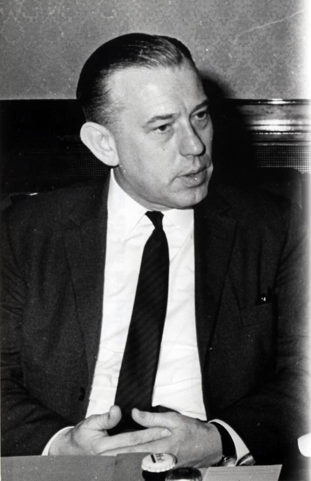 Baas, J. (VVD). Portret van Eerste Kamerlid J. Baas. 1966 of eerder.